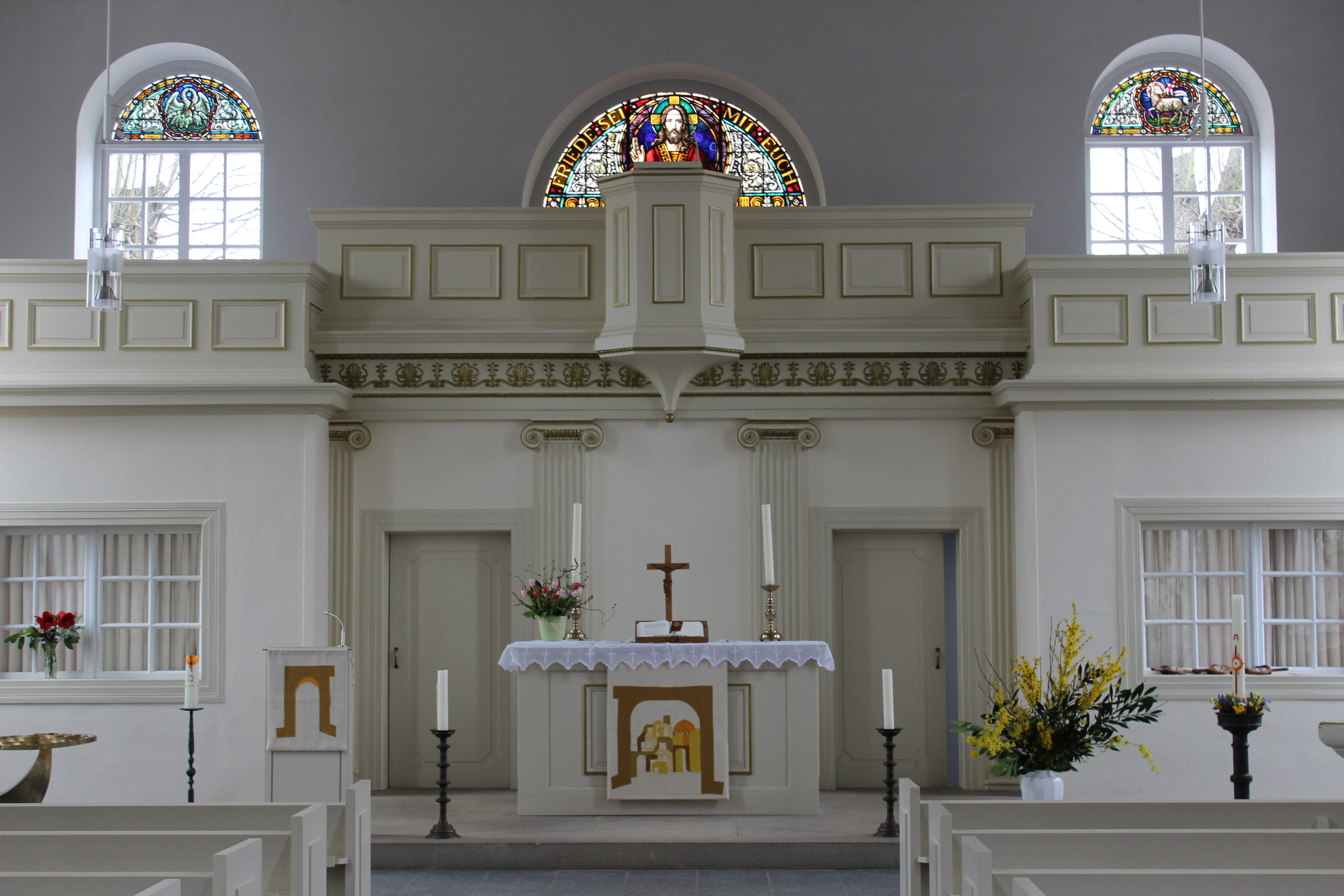 Anblick der St. Michaeliskirche (Bienenbüttel) von innen